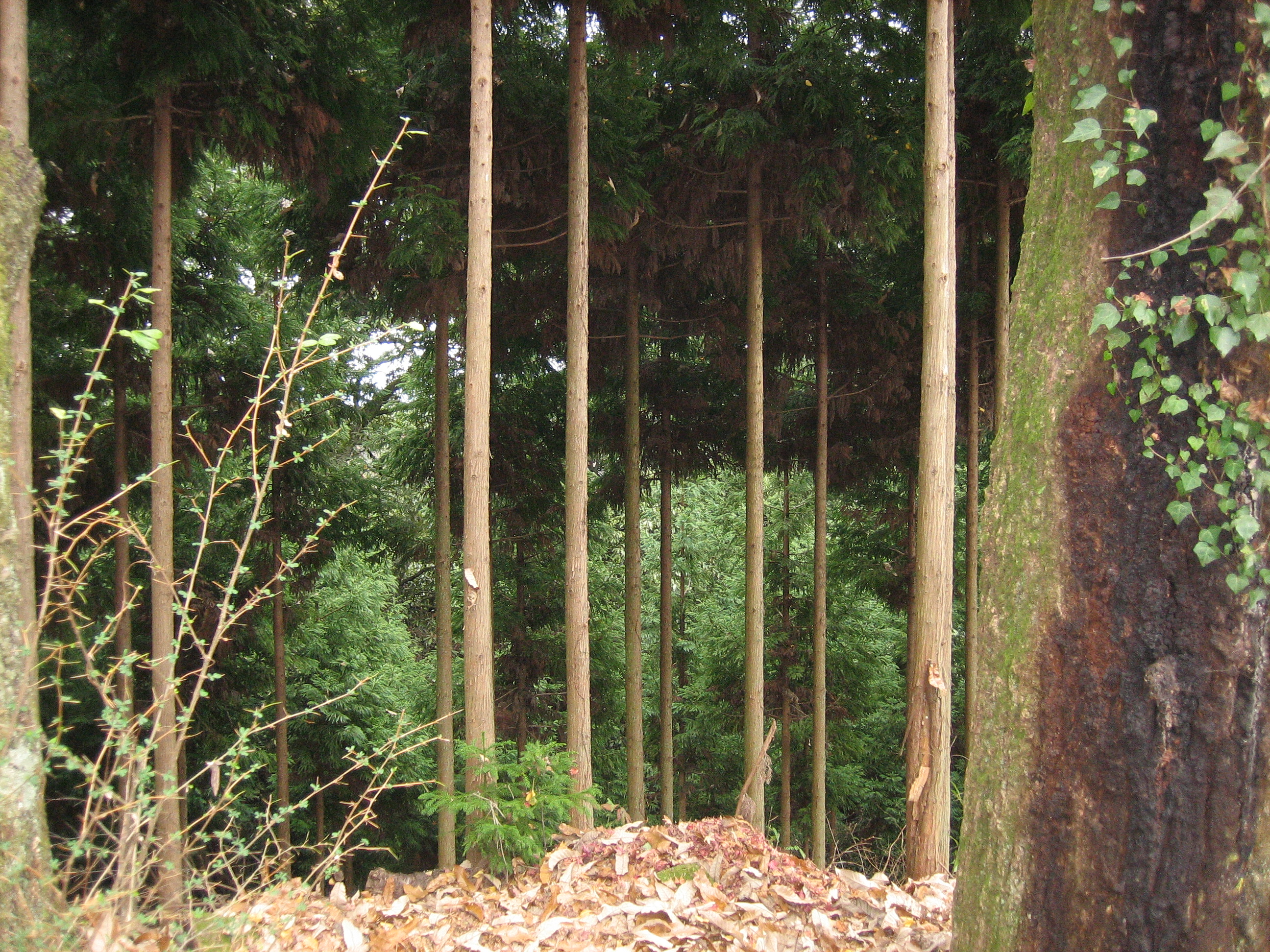 京見峠からの眺めを撮影